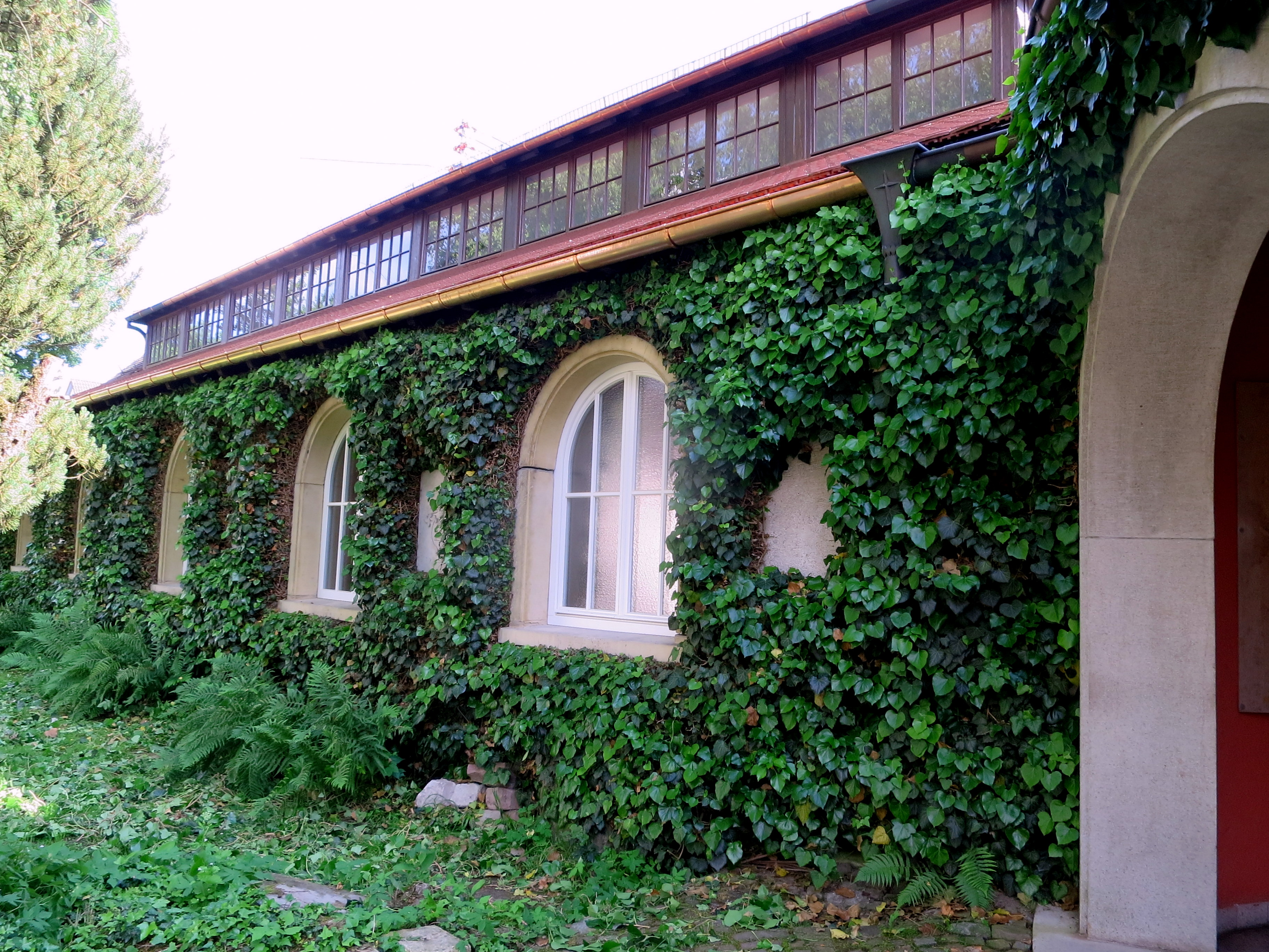 Außenfront des Museums